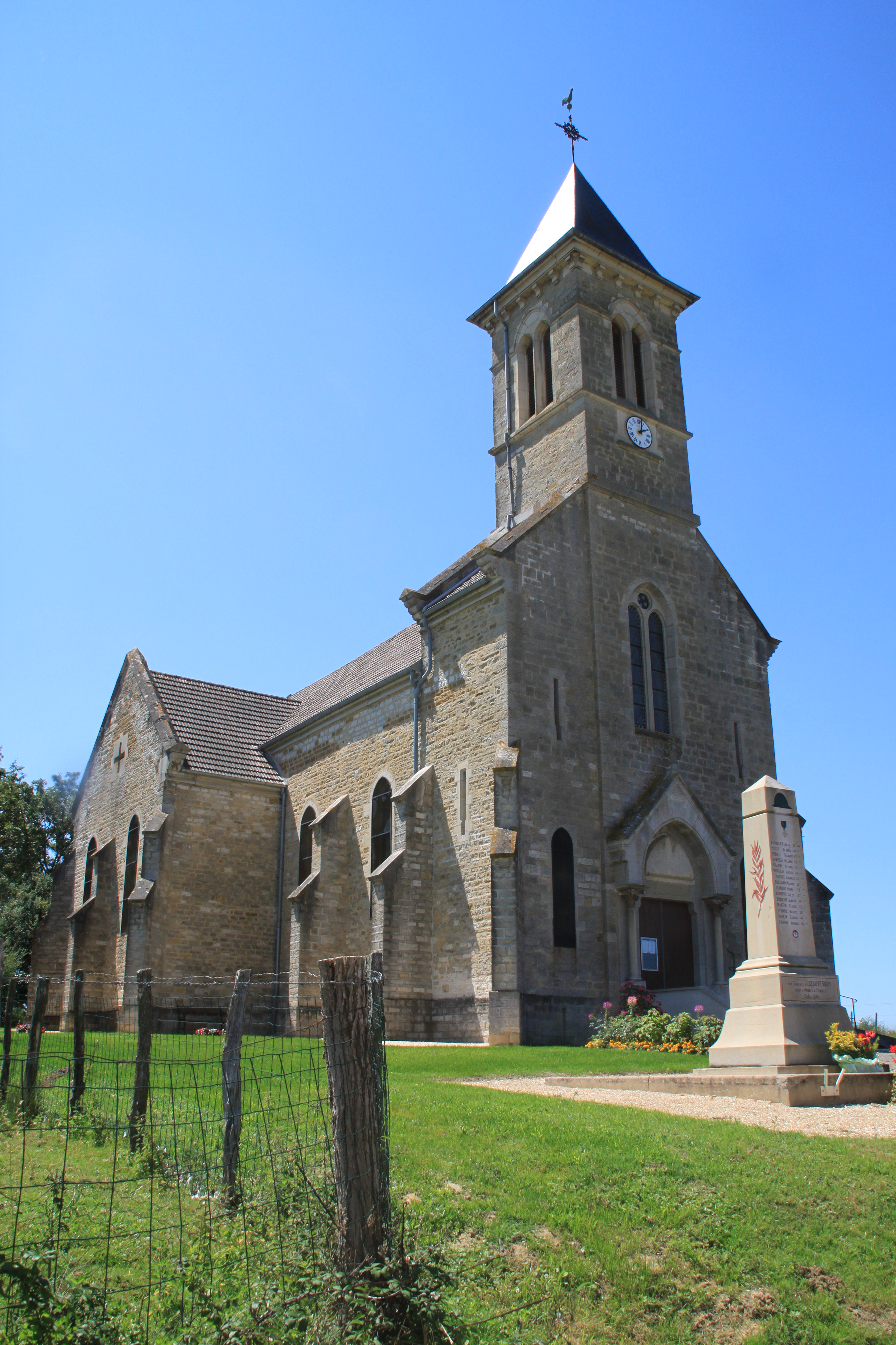 Beauvernois (Saône-et-Loire) Kirche mit Denkmal für die Gefallenen von der Mairie aus gesehen